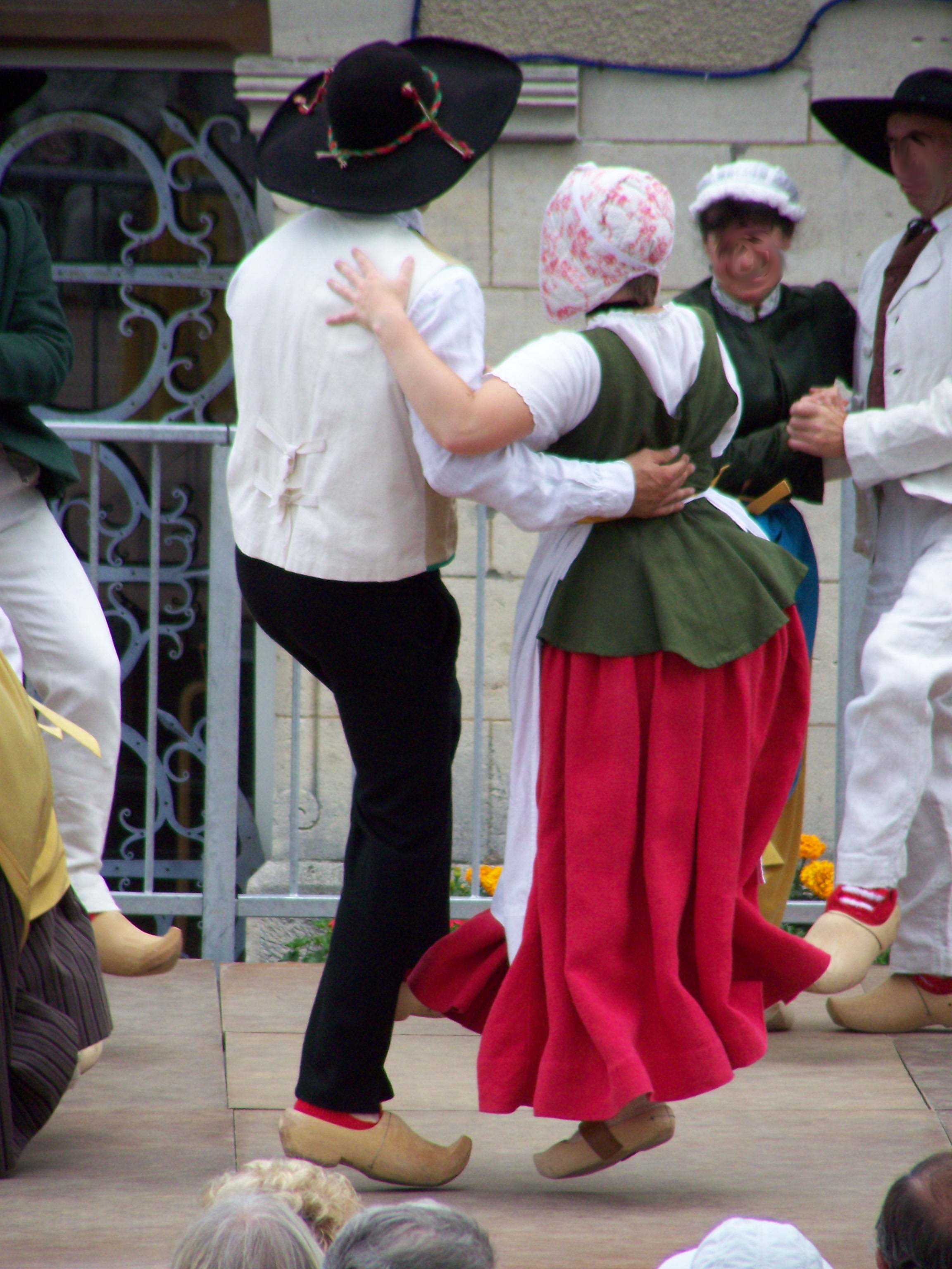 Costumes morvandiaux de la troupe Les Galvachers du Morvan. Photographie prise à Château-Chinon (Ville) en 2011 lors de la "Fête du 15 août en Morvan".